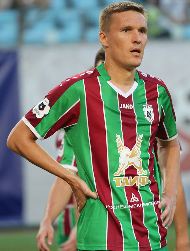 «Динамо» и «Рубин» обменялись голами